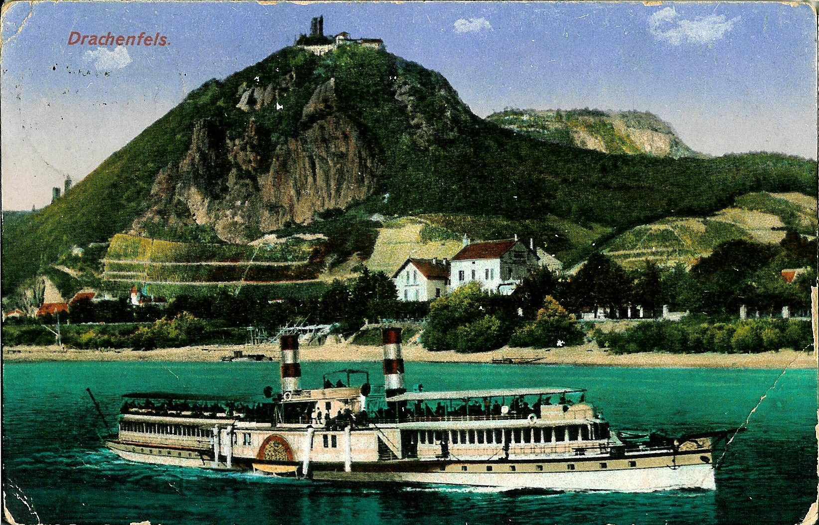 Mein Urgroßonkel Hans Doose fiel in mancherlei Hinsicht aus dem traditionellen Rahmen seiner Familie und war eine Art Freigeist. Obwohl er als ältester Sohn eigentlich Hoferbe gewesen wäre, zog er ein unabhängiges Leben in der Großstadt vor. Mindestens seit 1909 lebte er in Hamburg und ließ das Heimatdorf Westermühlen (Kreis Rendsburg-Eckernförde) hinter sich. Im Ersten Weltkrieg war er Soldat (Landsturmmann) und offenbar am Rhein stationiert, von wo er 1916 seiner dreizehnjährigen Nichte eine Ansichtskarte sandte. Nach dem Krieg lebte er wieder von seiner Arbeit als Schriftsetzer und Redakteur und blieb ledig. Nach der Machtergreifung der Nationalsozialisten nahm er sich vermutlich selbst das Leben. Königswinter 10.4.1916 (Poststempel) Motiv: Drachenfels mit Schiff auf dem Rhein Hans Doose an (seine Nichte) Anna Storm: „Drachenfeld, 9. III. Liebe Anna! Herzl. Grüße sendet Dir vom Ausflug ins Siebengebirge Dein Onkel Hans Abs. Ldstm. Doose, 1. Komp. Ers. Btn. (?) Ldw. Inf. Reg. 29. Brühl (Cöln)“